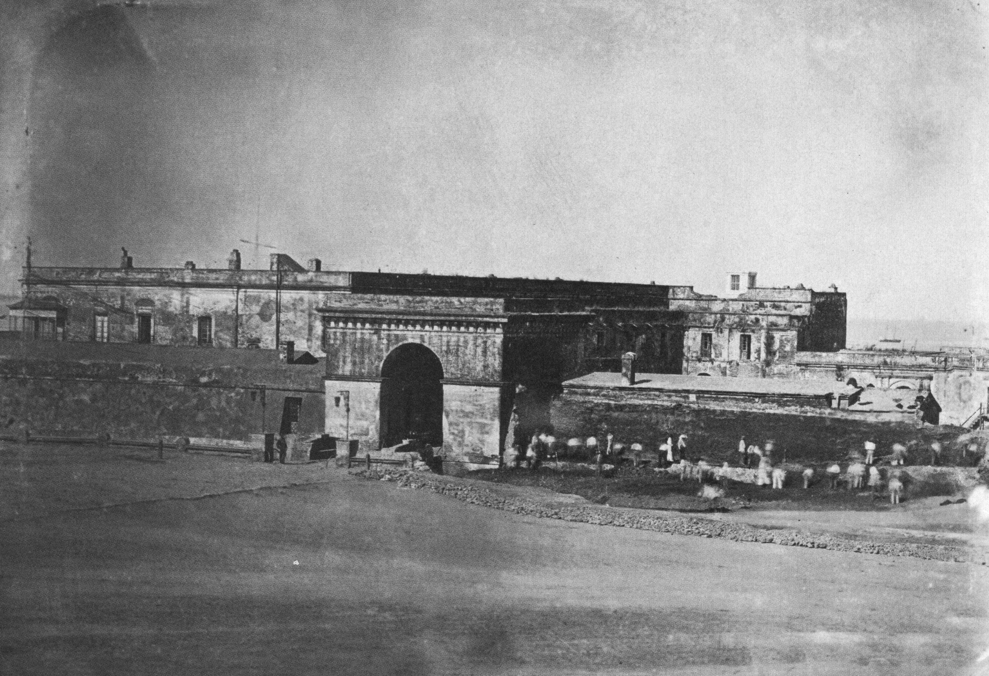 El Fuerte de la Ciudad de Buenos Aires, antes de su demolición. El fuerte estaba ubicada donde esta hoy la Casa Rosada.